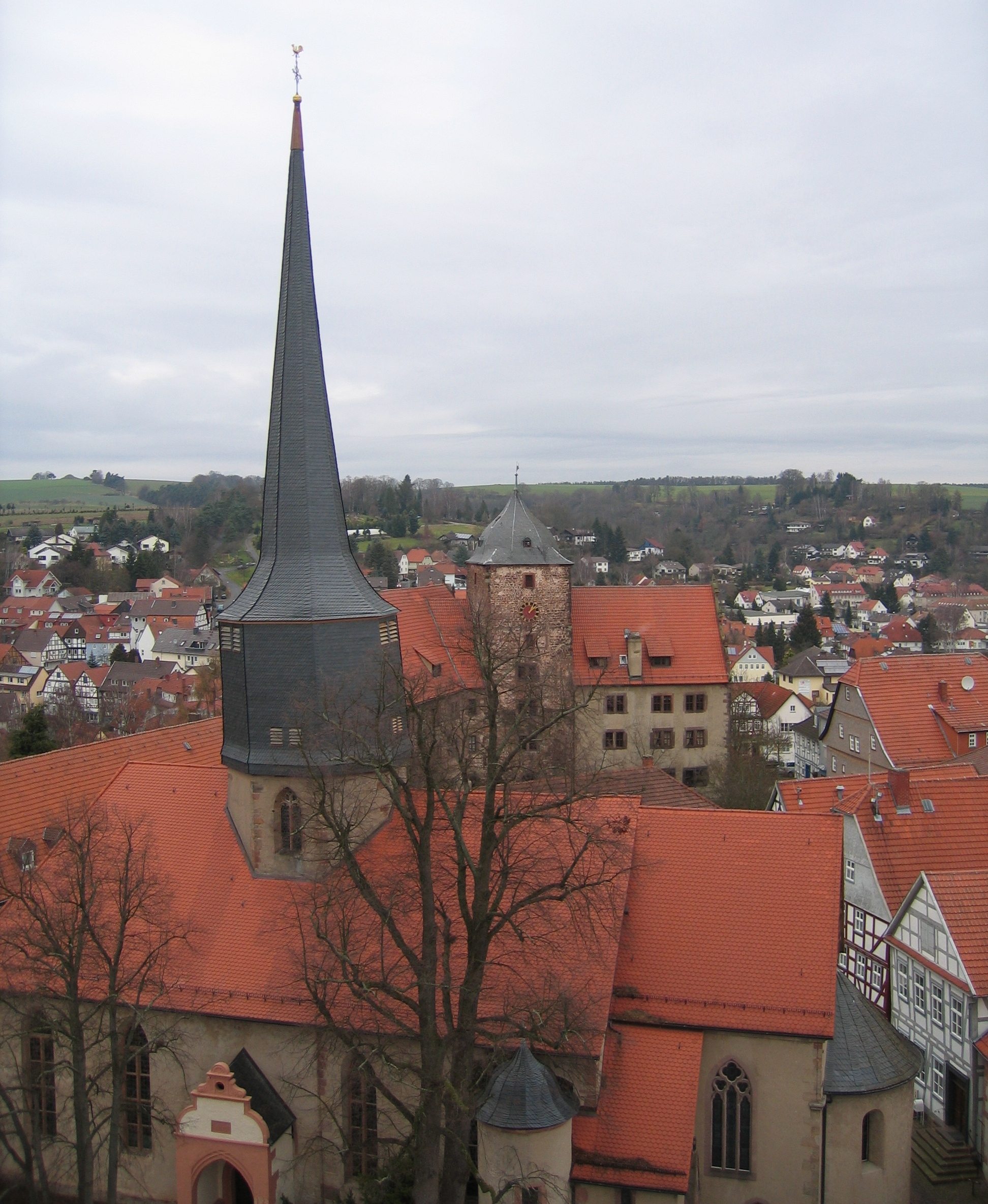 Evangelische Stadtkirche in Schlitz (Vogelsbergkreis)